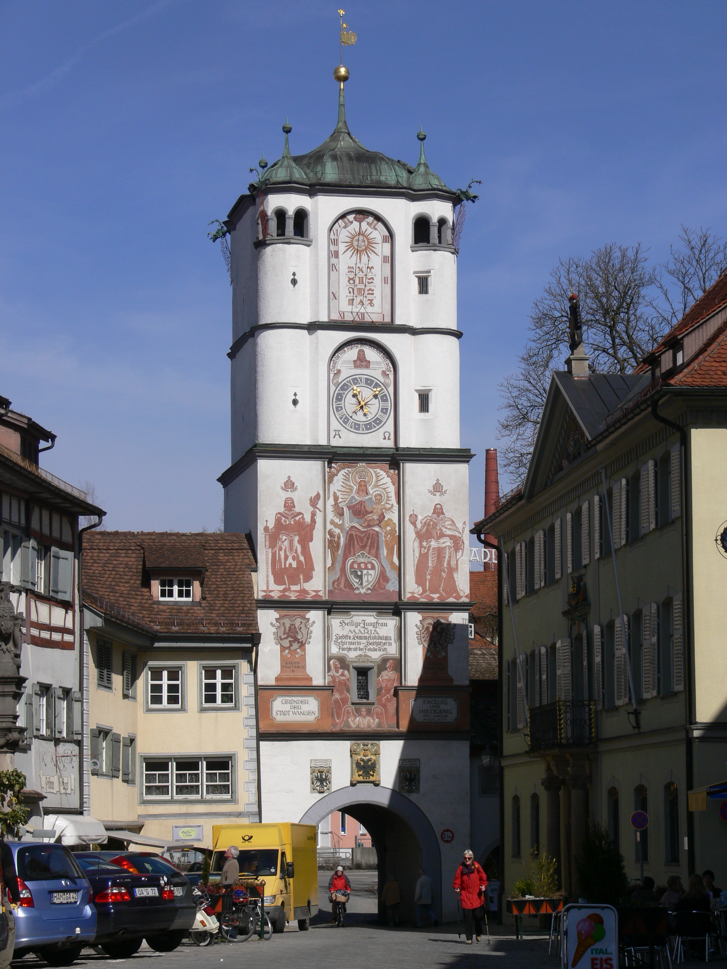 Wangen im Allgäu, Ravensburger Tor, Stadtseite